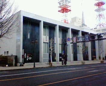 北日本銀行 本店（店番：002）